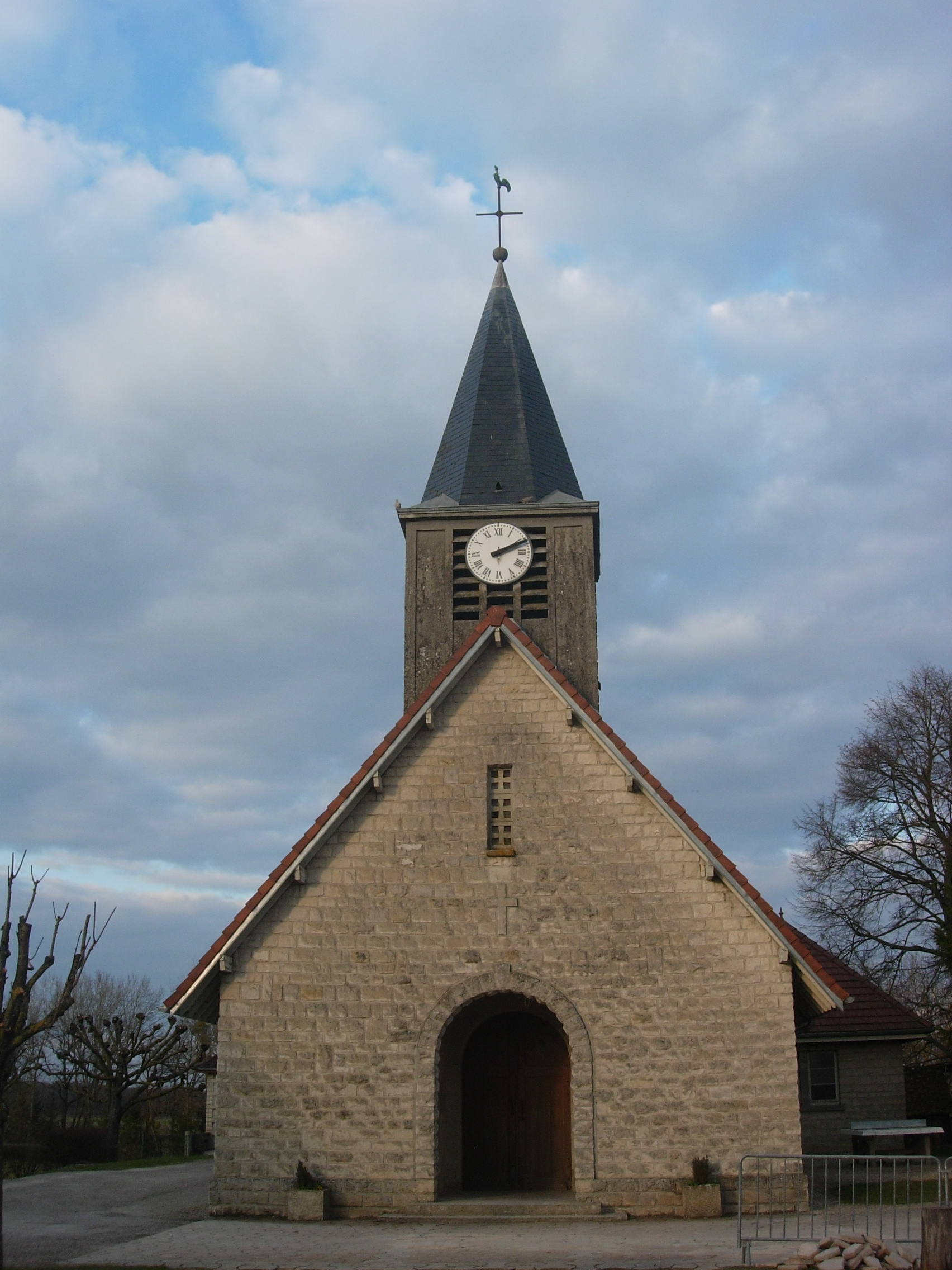 Eglise de Courteranges